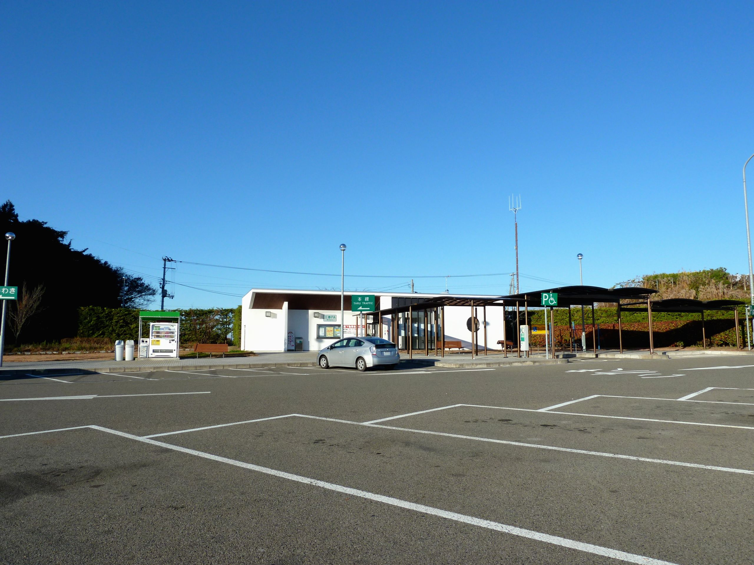 磐越自動車道 三春パーキングエリア（上り線）